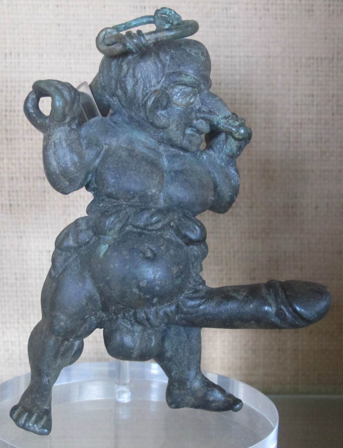 Museo Archeologico Nazionale G.C.Mecenate - MIBAC This is a photo of a monument which is part of cultural heritage of Italy.